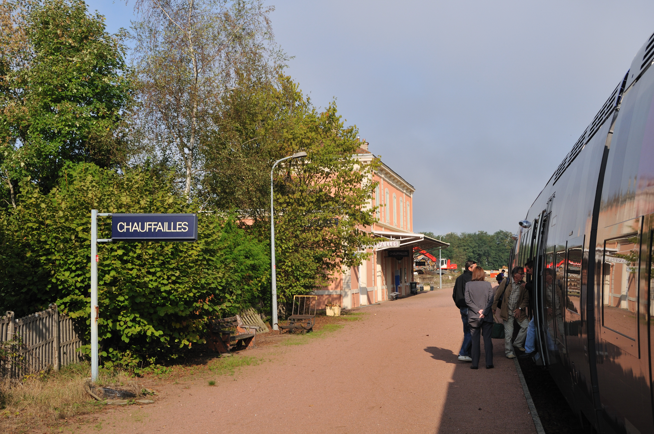 Gare de Chauffailles, Saône-et-Loire, France